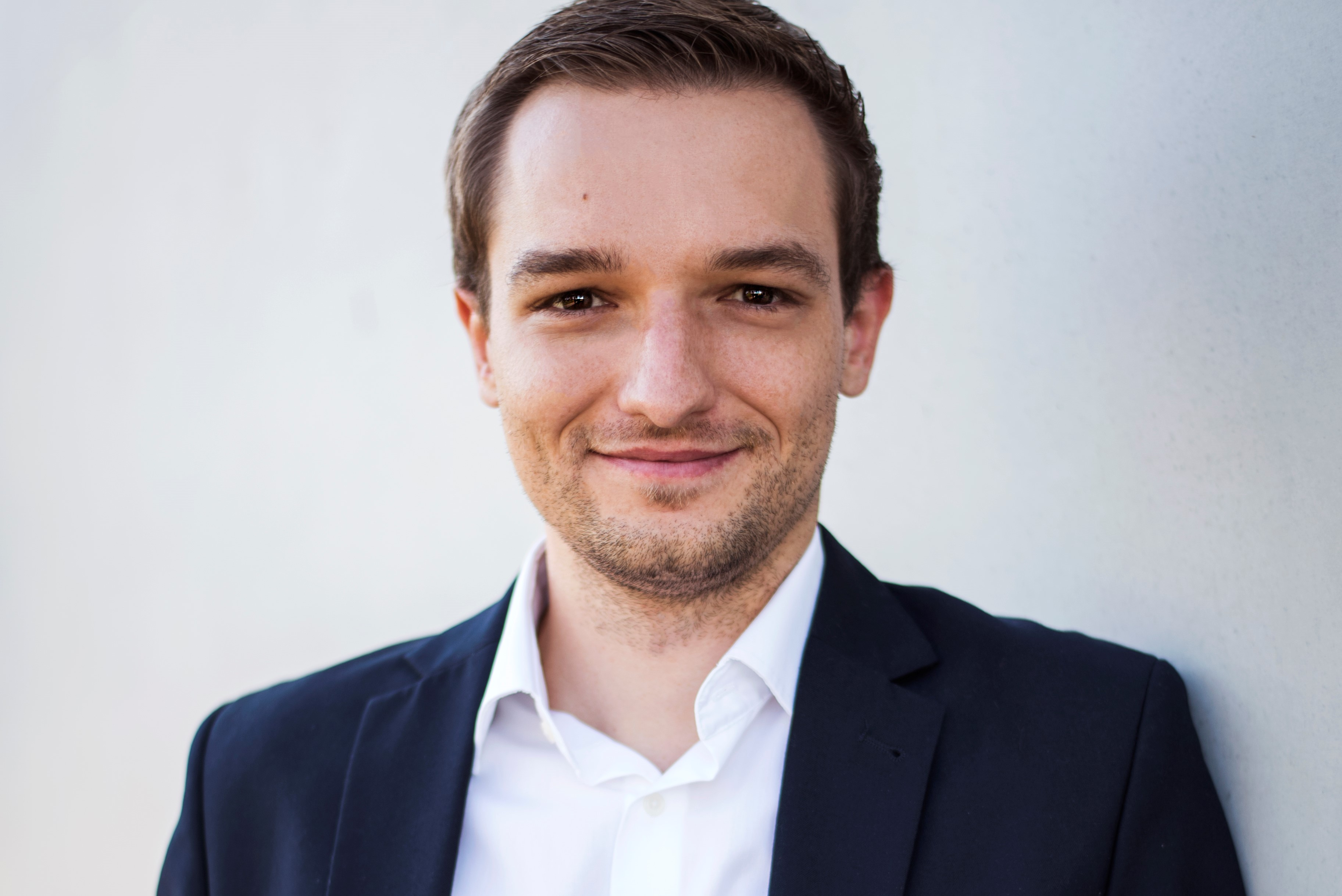 Porträtfoto von Benjamin Strasser